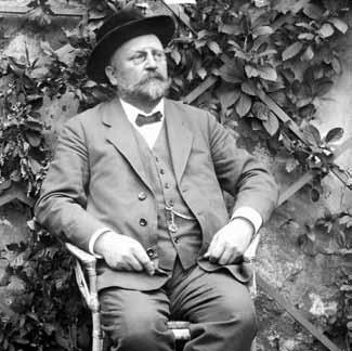 Josef Vejnar, český lékař a amatérský fotograf